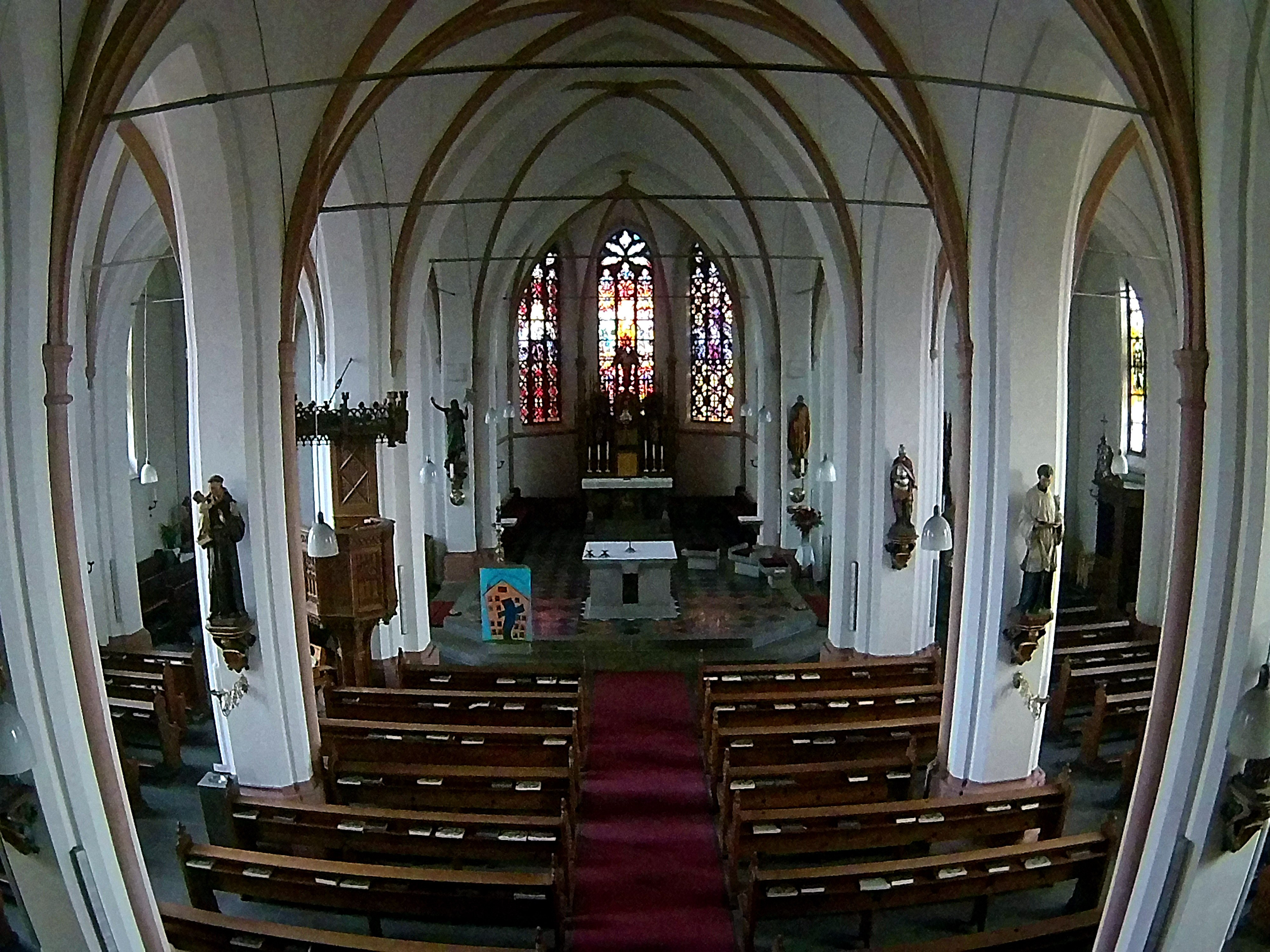 Katholische Kirche St. Michael Innen